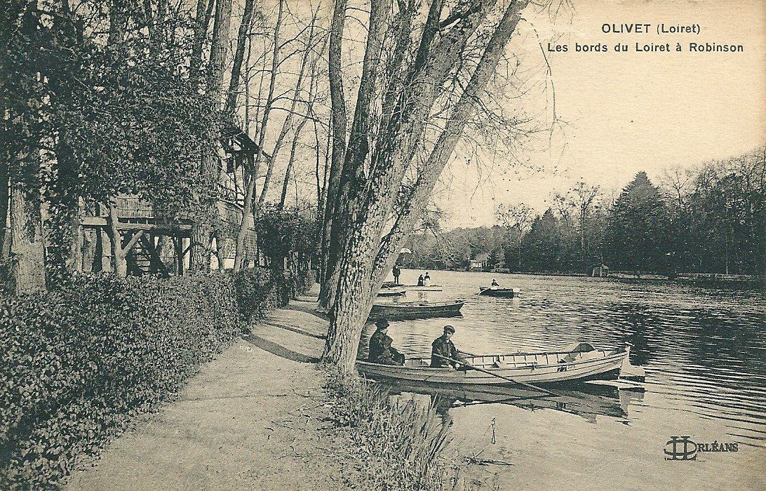 Olivet (Loiret). Vers 1920, les guinguettes sur les bords du Loiret, sur le sentier des Prés (vue vers l'amont). Les guinguettes s'appelaient « Robinson » (devenu « le Rivage »), « Les Quatre saisons » (devenu « le Pavillon bleu ») et « À Madagascar ». Voir "Les bonnes tables à connaître sur les bords du Loiret" sur larep.fr.